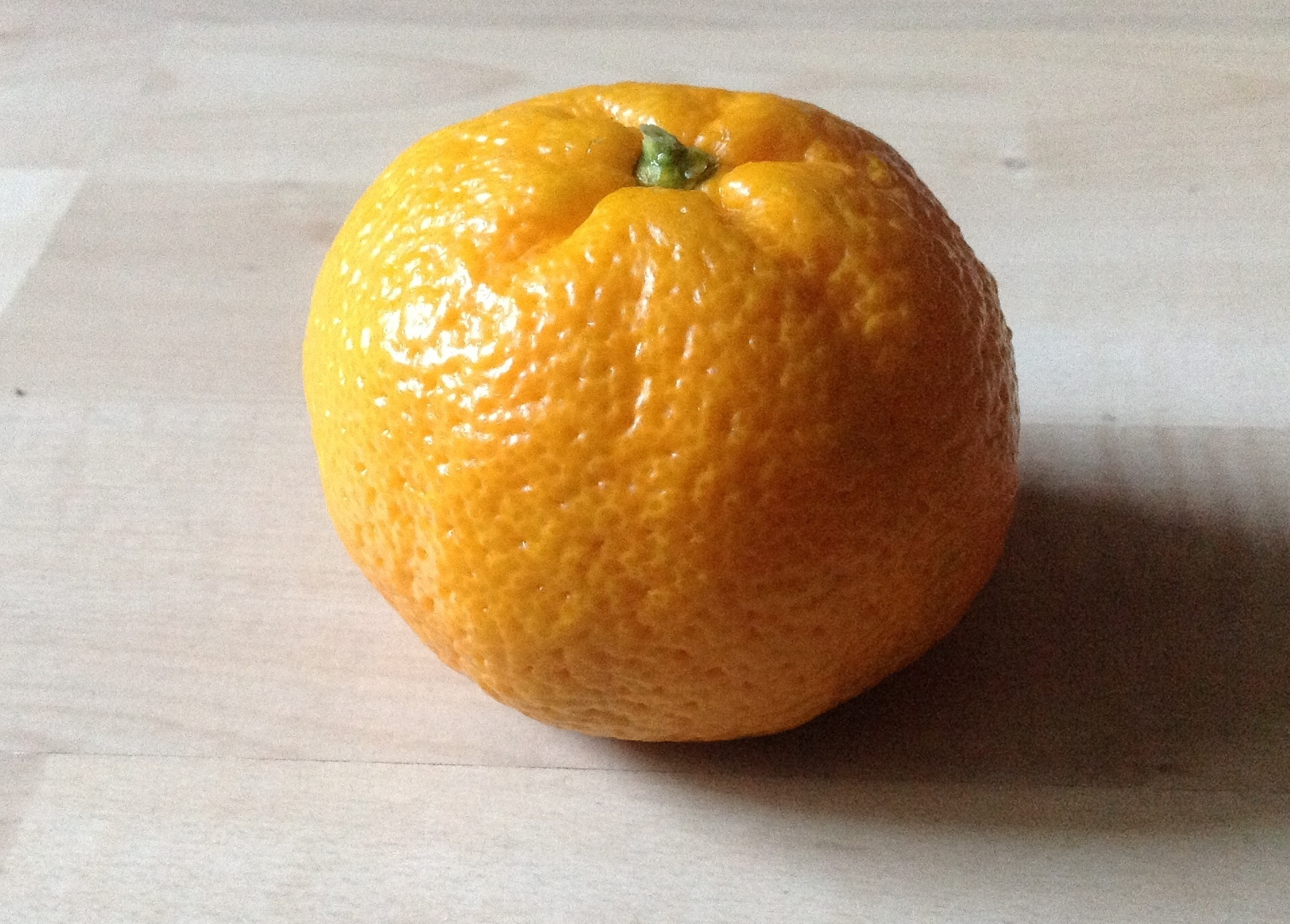 Eine Mandarine.